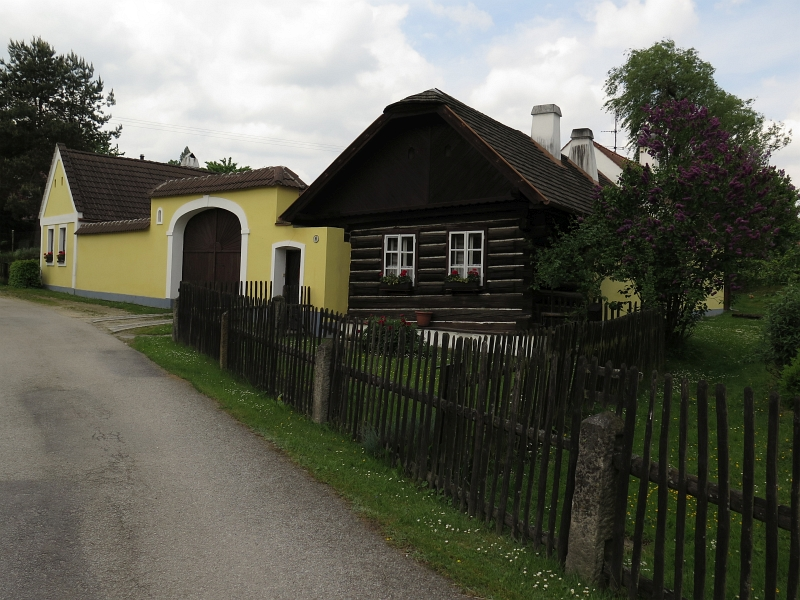 Usedlost čp. 6, Dvorec 6, Dvorec.